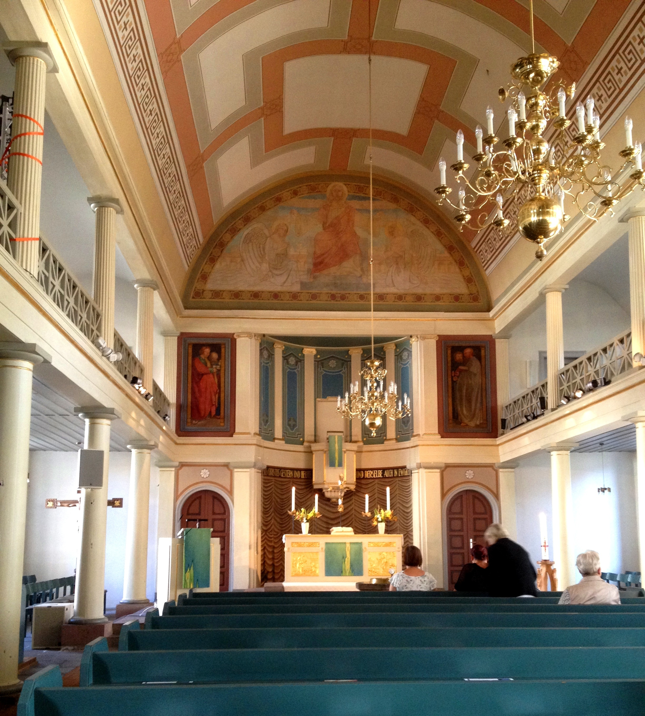 Bad Münder, ev.-luth. Petri-Pauli-Kirche, Inneres